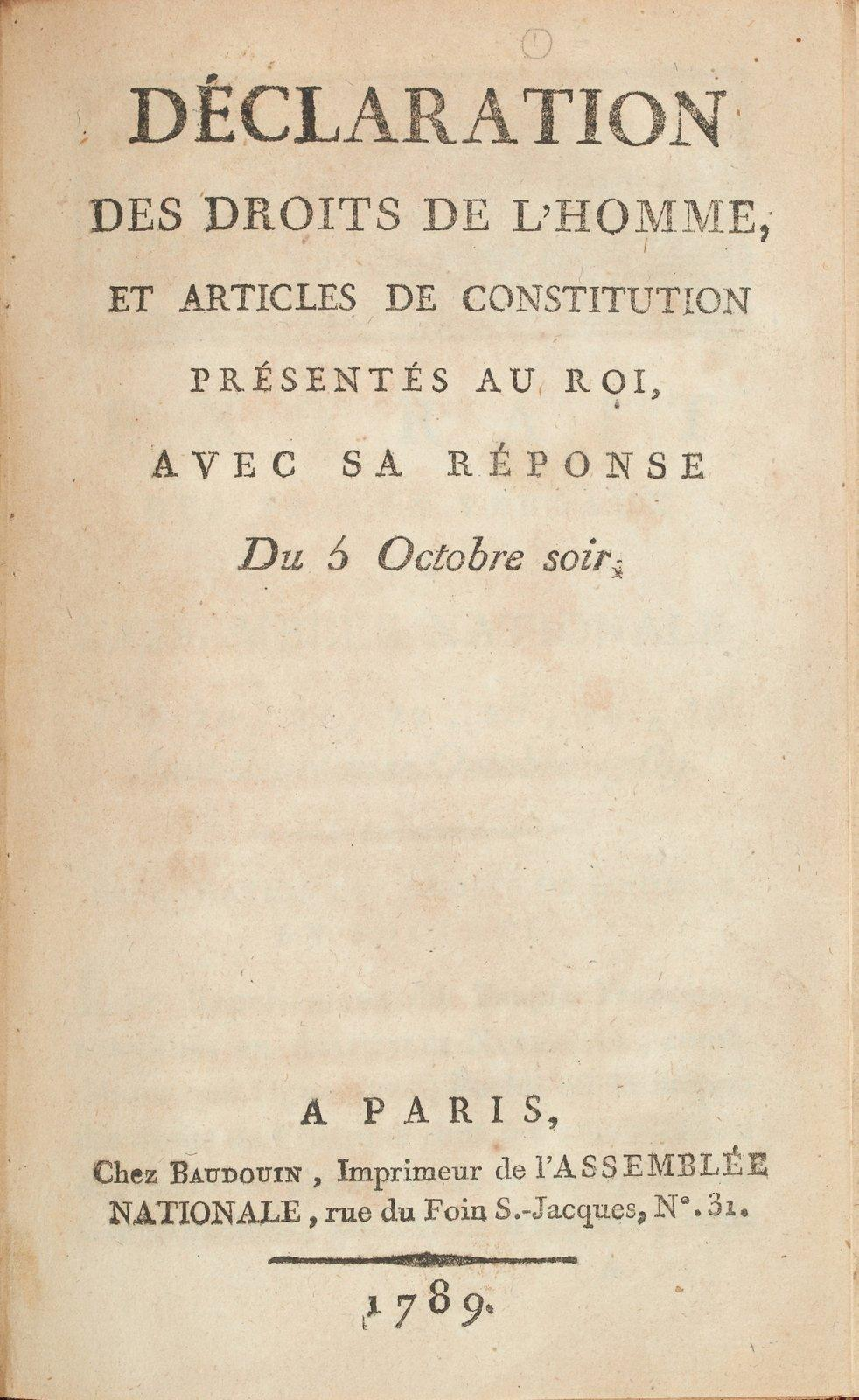 Cover page